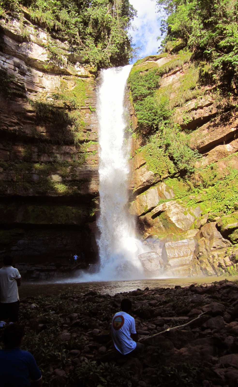 CATARATA SALTO DEL COTOMONO